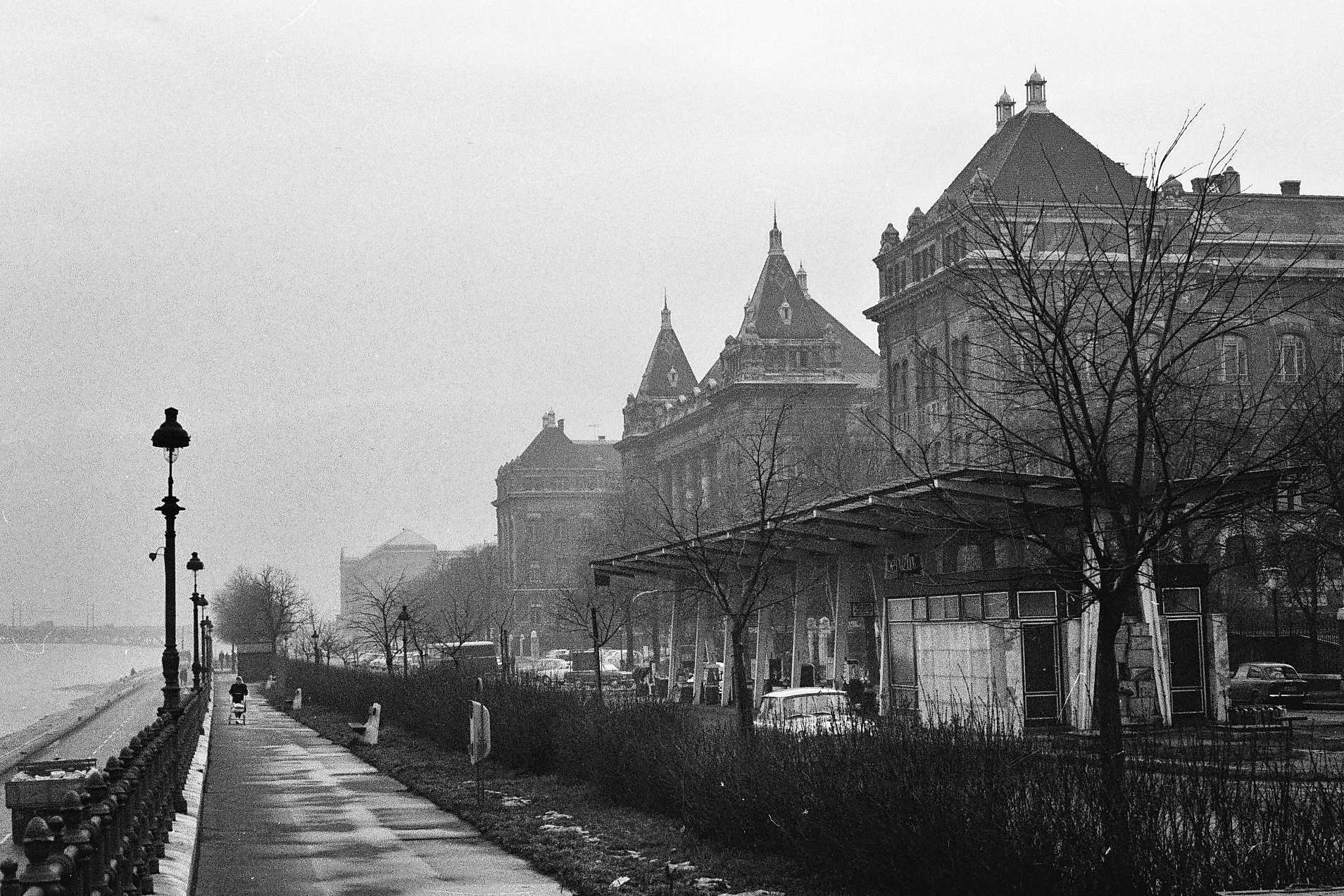 Műegyetem rakpart. Location: Hungary, Budapest XI. Tags: gas station, Budapest Title: Műegyetem rakpart.